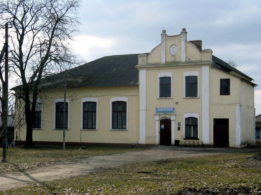 Беларуская (тарашкевіца): Клецак